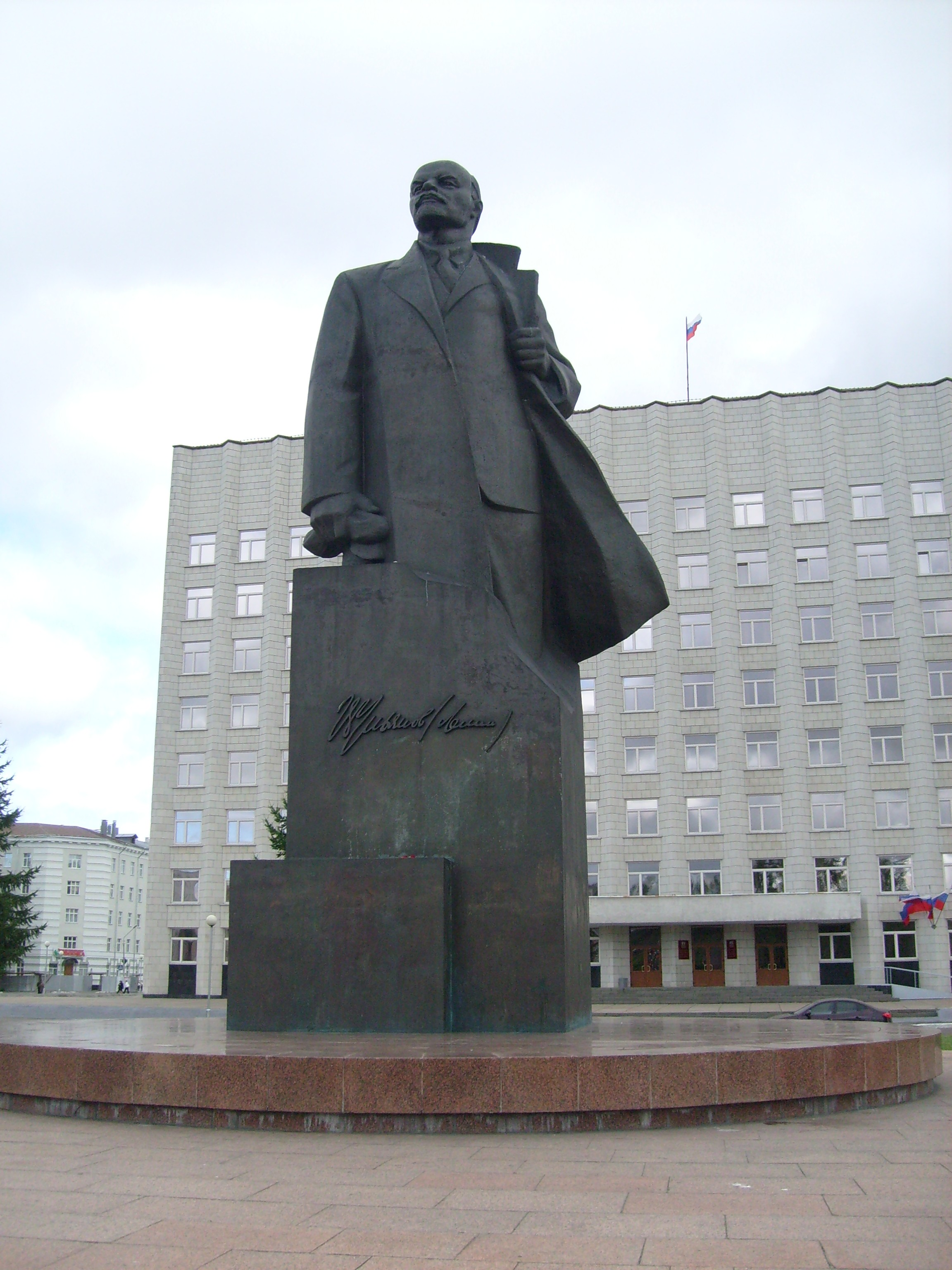 Памятник Ленину на площади Ленина, Архангельск